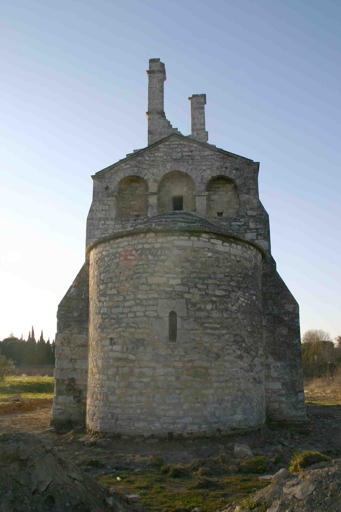 Eglise Saint-Laurent de Jonquières (30). Vue générale de l'abside.